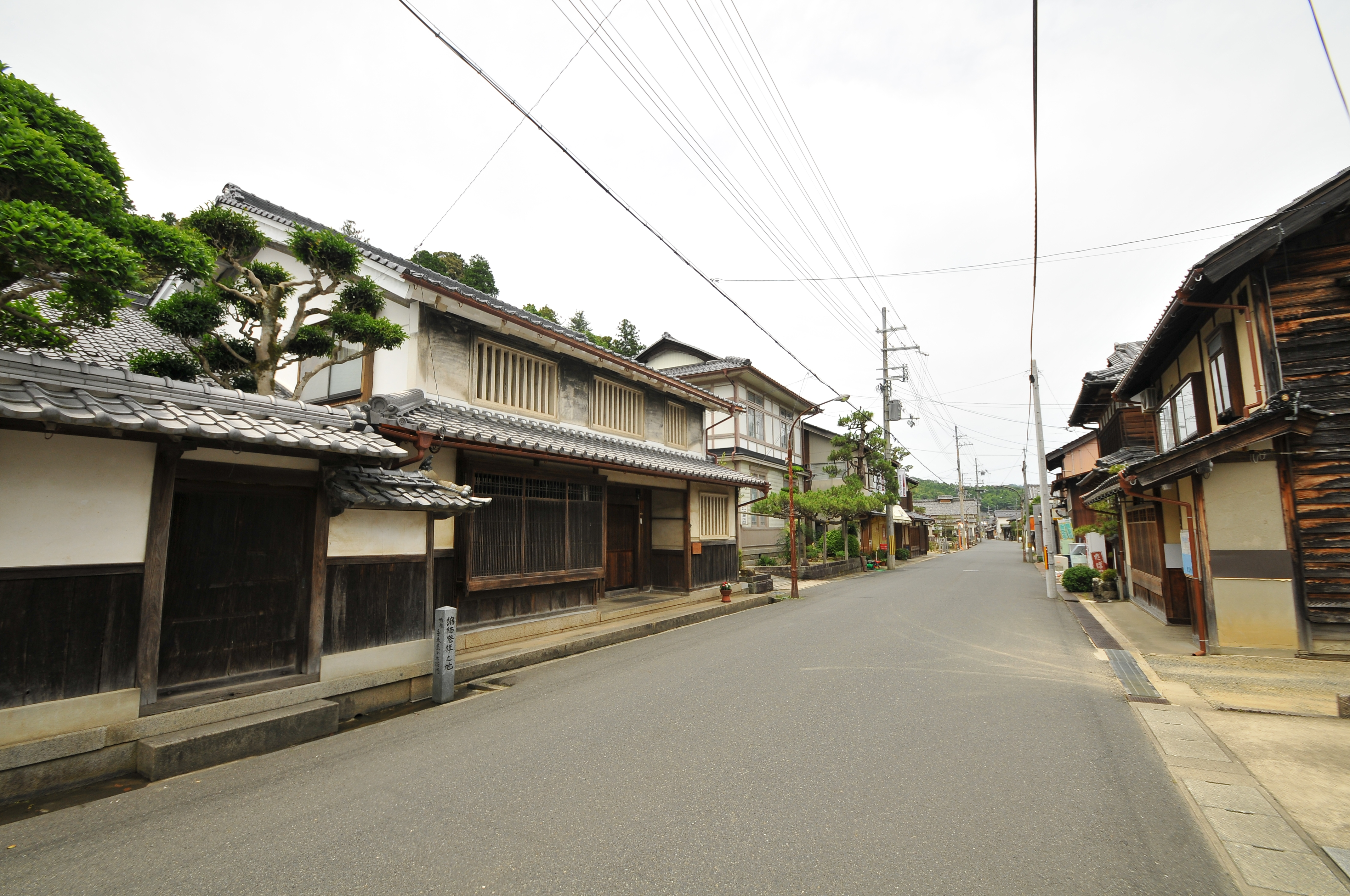 京都府与謝野町加悦の古い町並み